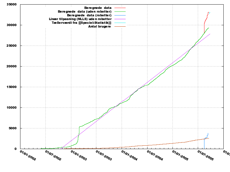 Udviklingen i artikeltallet og antal brugere der har startet mindst en ny artikel på den danske wikipedia. Data der er angivet som beregnede er trukket ud af databasedumpet fra 17. september 2005. Konstrueret ved hjælp af mysql, grep, uniq, sort, cut, sed og gnuplot af uploader.